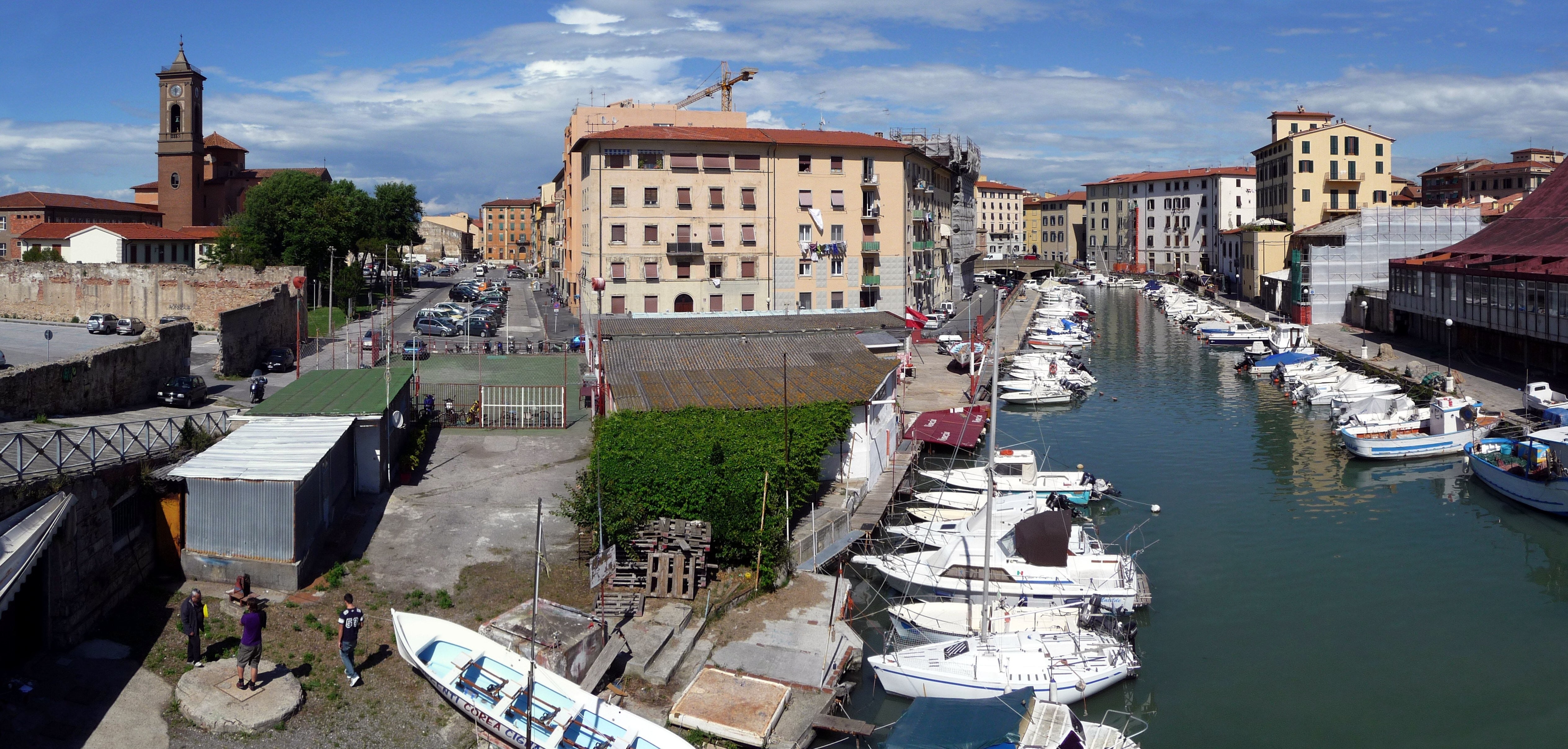 Venezia Nuova, Livorno. Seen from Port to East.